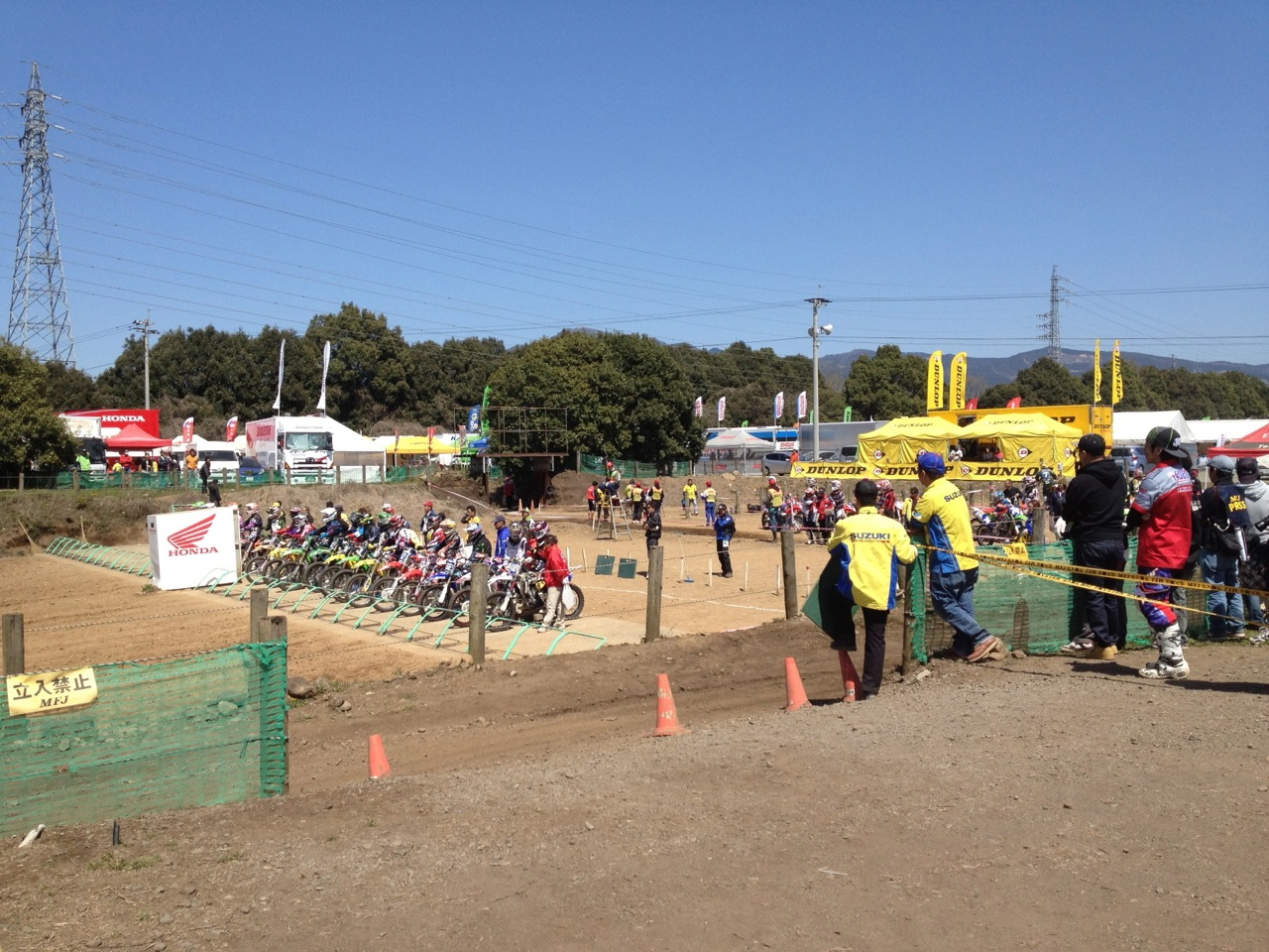 HSR九州オフロードコース HSR Kyushu Offroad Circuit